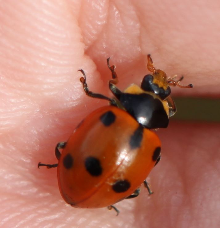 Marienkäfer Hippodamia undecimpunctata am 8. November 2018 in Walldorf/Baden